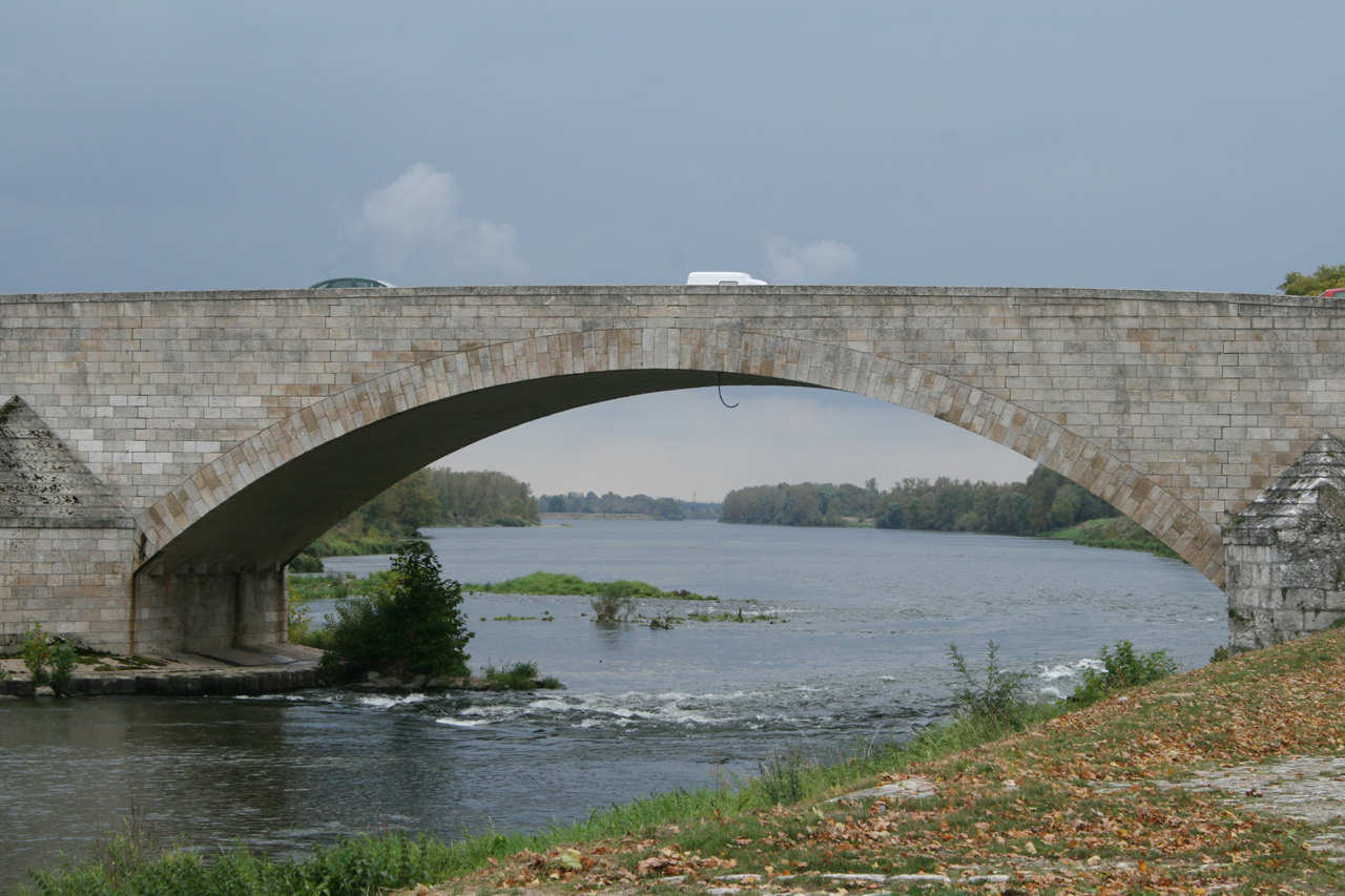 Pont sur la Loire à Beaugency